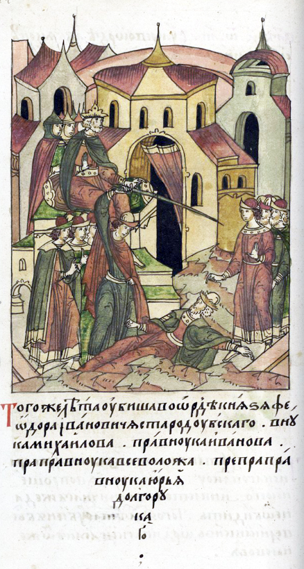 ЛИЦЕВОЙ ЛЕТОПИСНЫЙ СВОД В том году убили в Орде князя Феодора Ивановича Стародубского, внука Михайлова, правнука Иванова, праправнука Всеволодова, препраправнука Юрия Долгорукого.